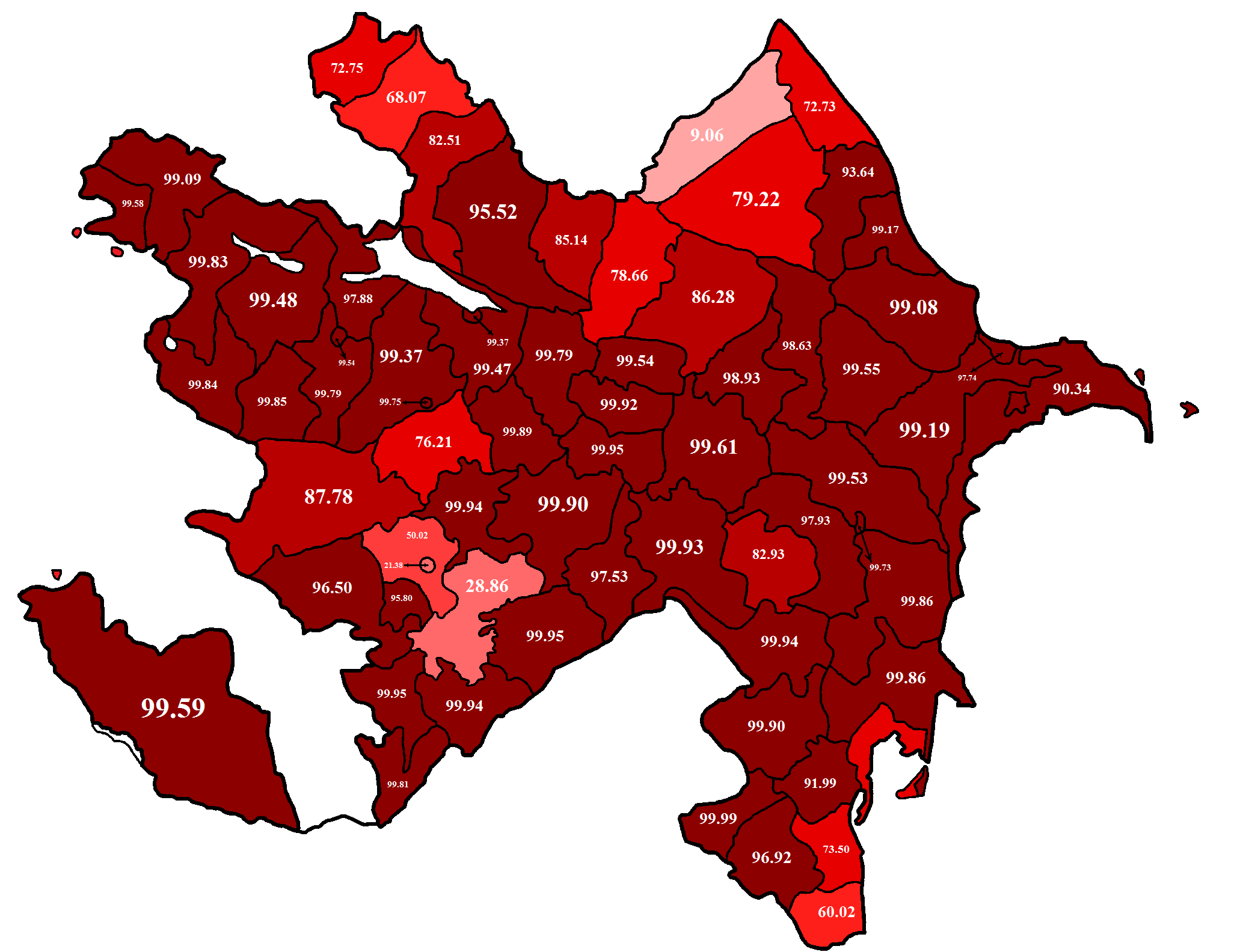 2009–cu il siyahıyaalınmasının yekunlarına əsasən etnik azərbaycanlıların (türklərin) Azərbaycan Respublikası rayonlarının və respublika tabeli şəhərlərinin ümumi əhalisi içində nisbətlərini əks etdirən xəritə.